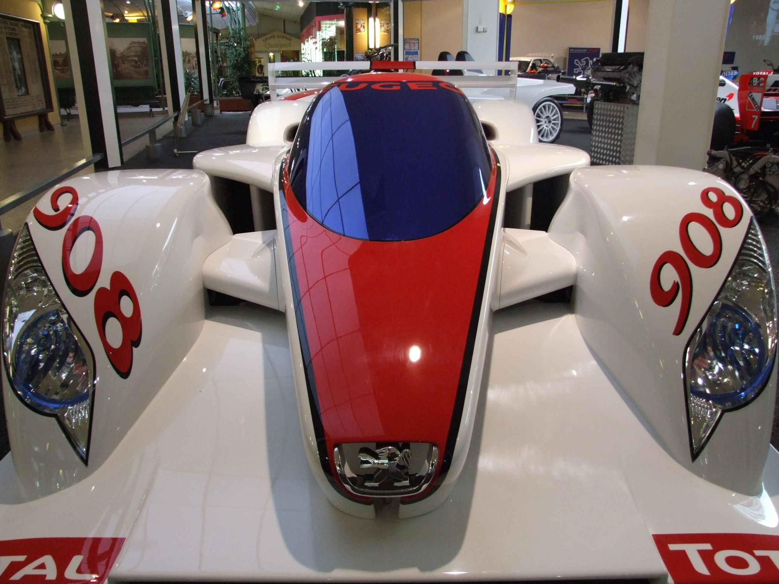 Peugeot 908, Musée de l'Aventure Peugeot-Sochaux, Sochaux, Doubs, Franche-Comté, FRANCE